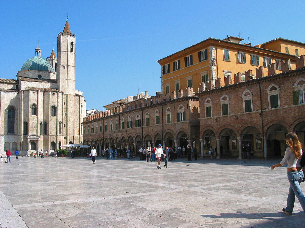 Ascoli Piceno, Marche, Italiasept.11.2003 Ascoli Piceno, Piazza del Popolo 016